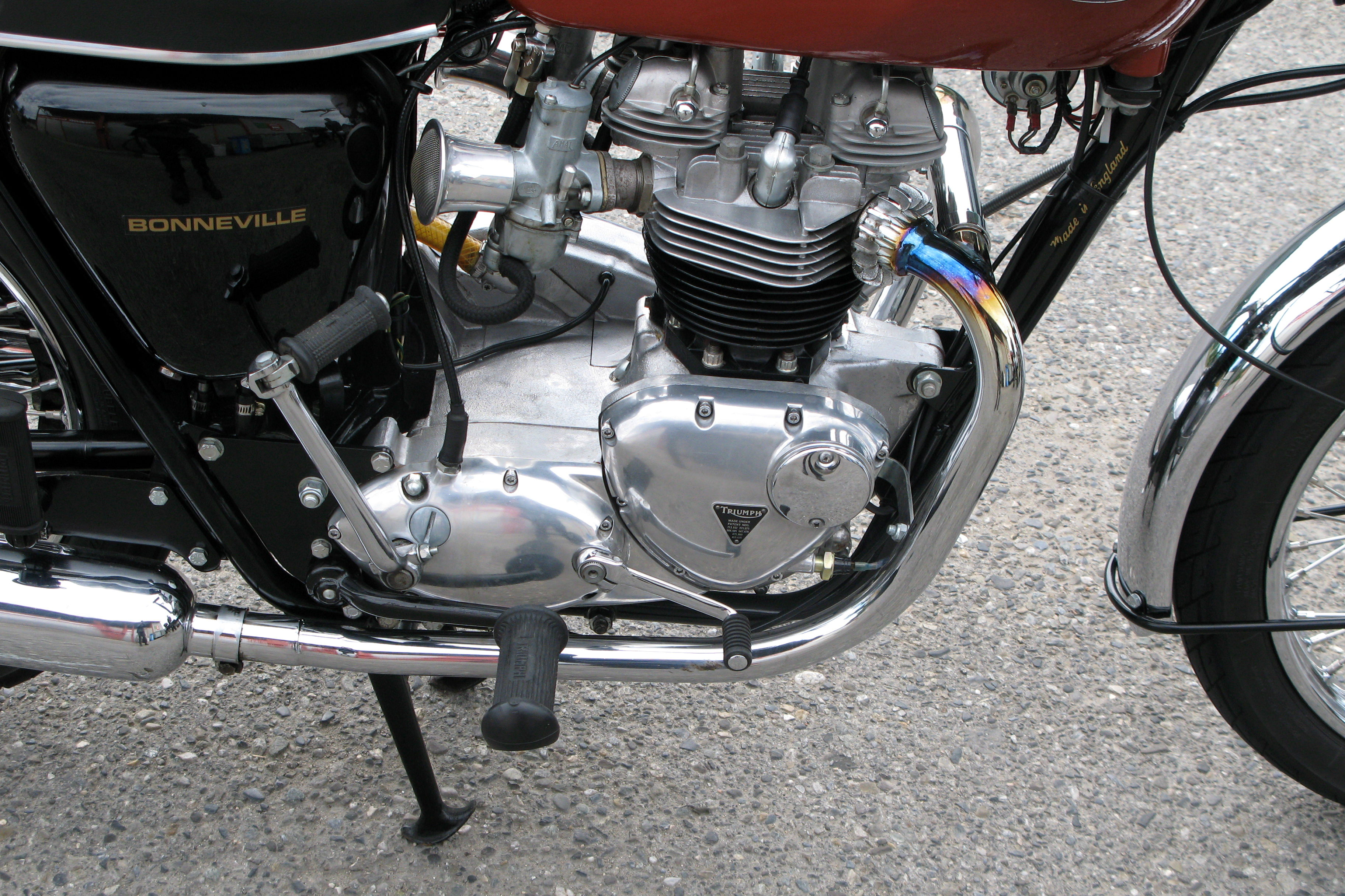 Vintage Triumph Bonneville